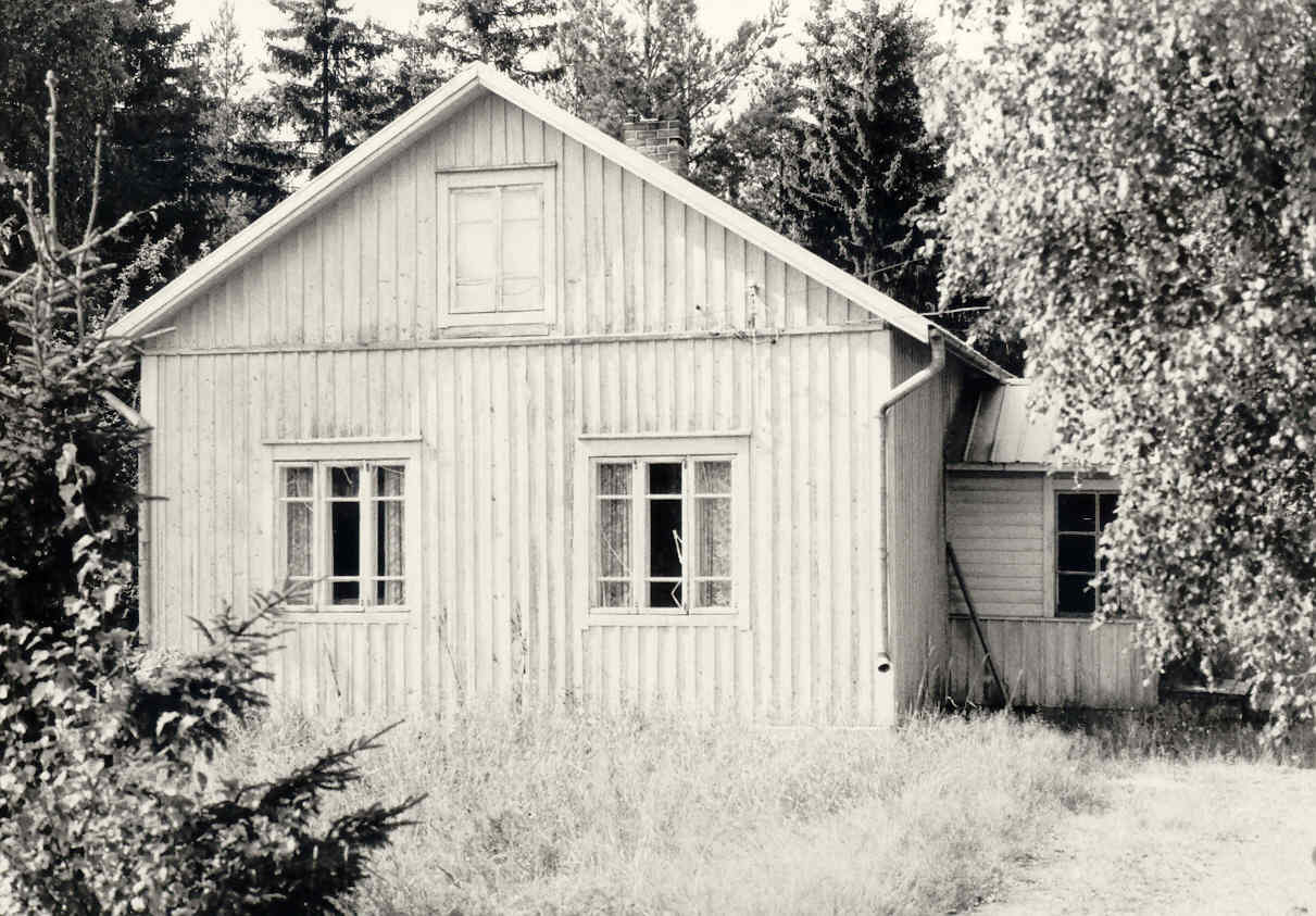 Ett bostadshus i Skaftung (augusti 1990), en bild tagen av Harri Blomberg.